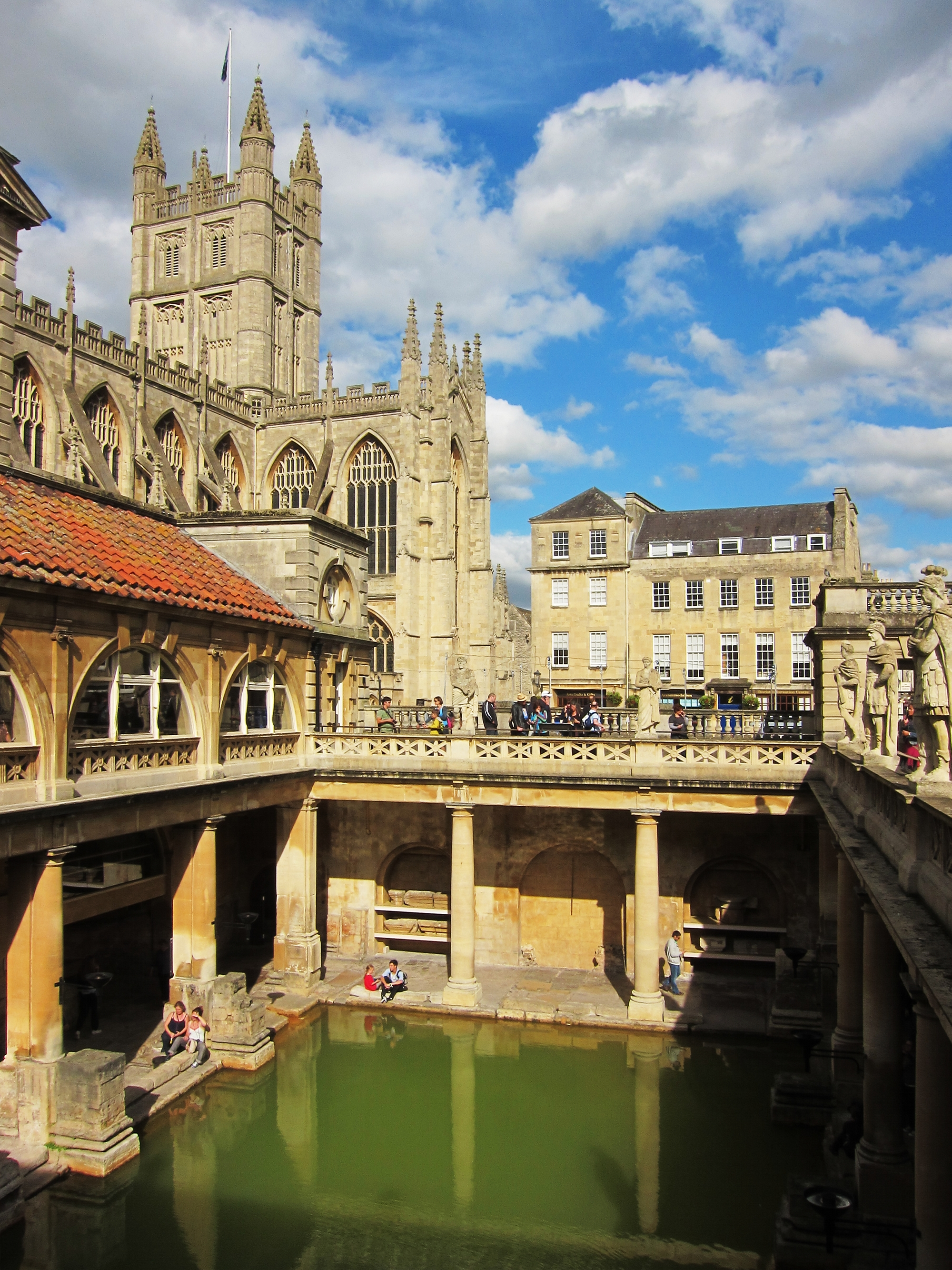 Le grand bassin des thermes romains de Bath.